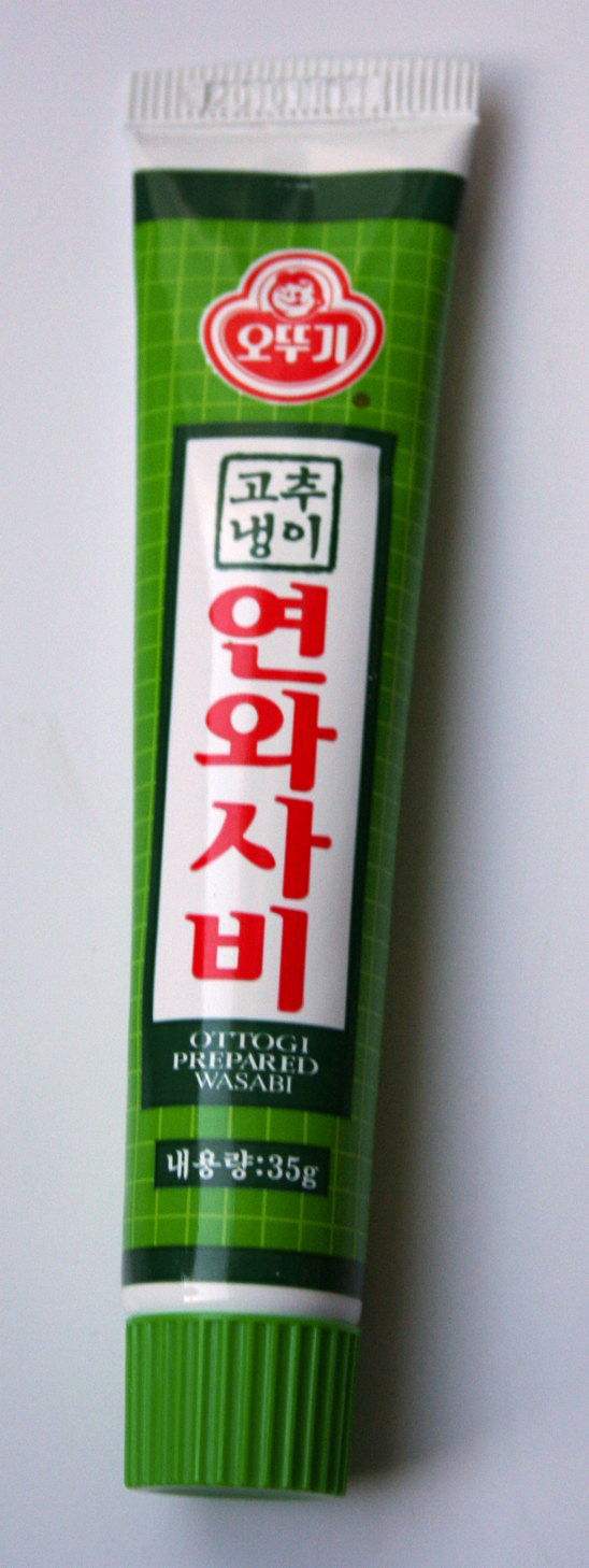 Tube mit Wasabipaste